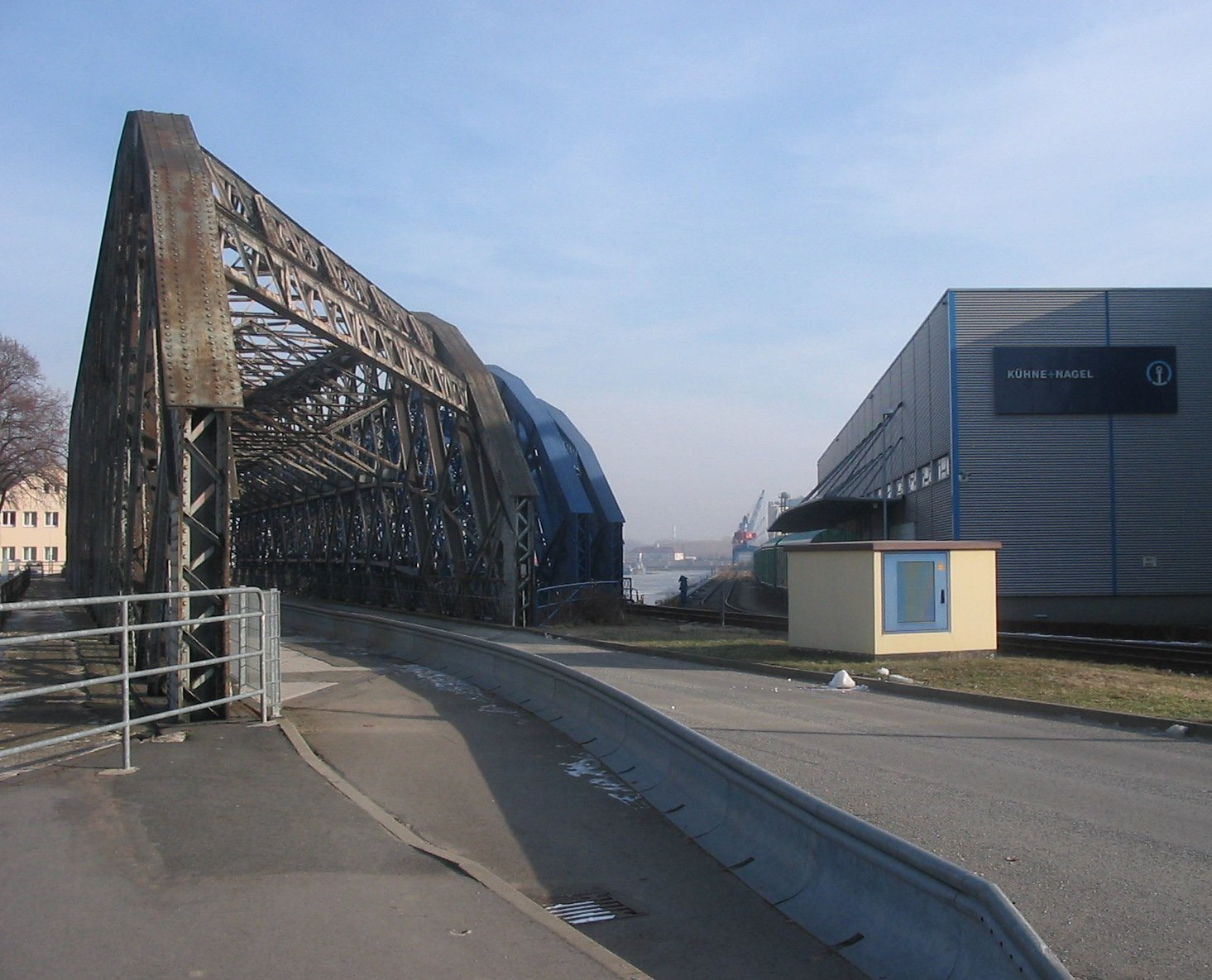 Hafenbrücken des Alberthafens in Dresden-Friedrichstadt.